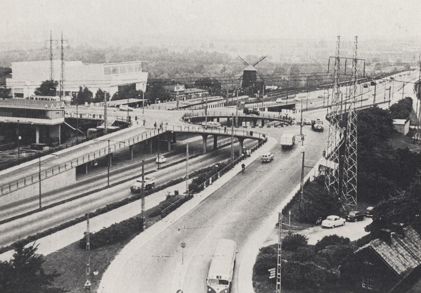 Korsningen Nynäsvägen / Huddingevägen, vy mot nordväst. Trots att källan anger att bilden skall vara tagen 1947 finns det skäl att anta att den i själva verket är tagen någon gång mellan 1960-64 av flera skäl; det står ett tunnelbanetåg inne på stationen (vilket daterar bilden till efter 1950; och Enskedehallen (den stora vita byggnaden) stod klar först 1960. Sannolikt är det buss 70 på bilden, en busslinje som lades den den 5 april 1964.